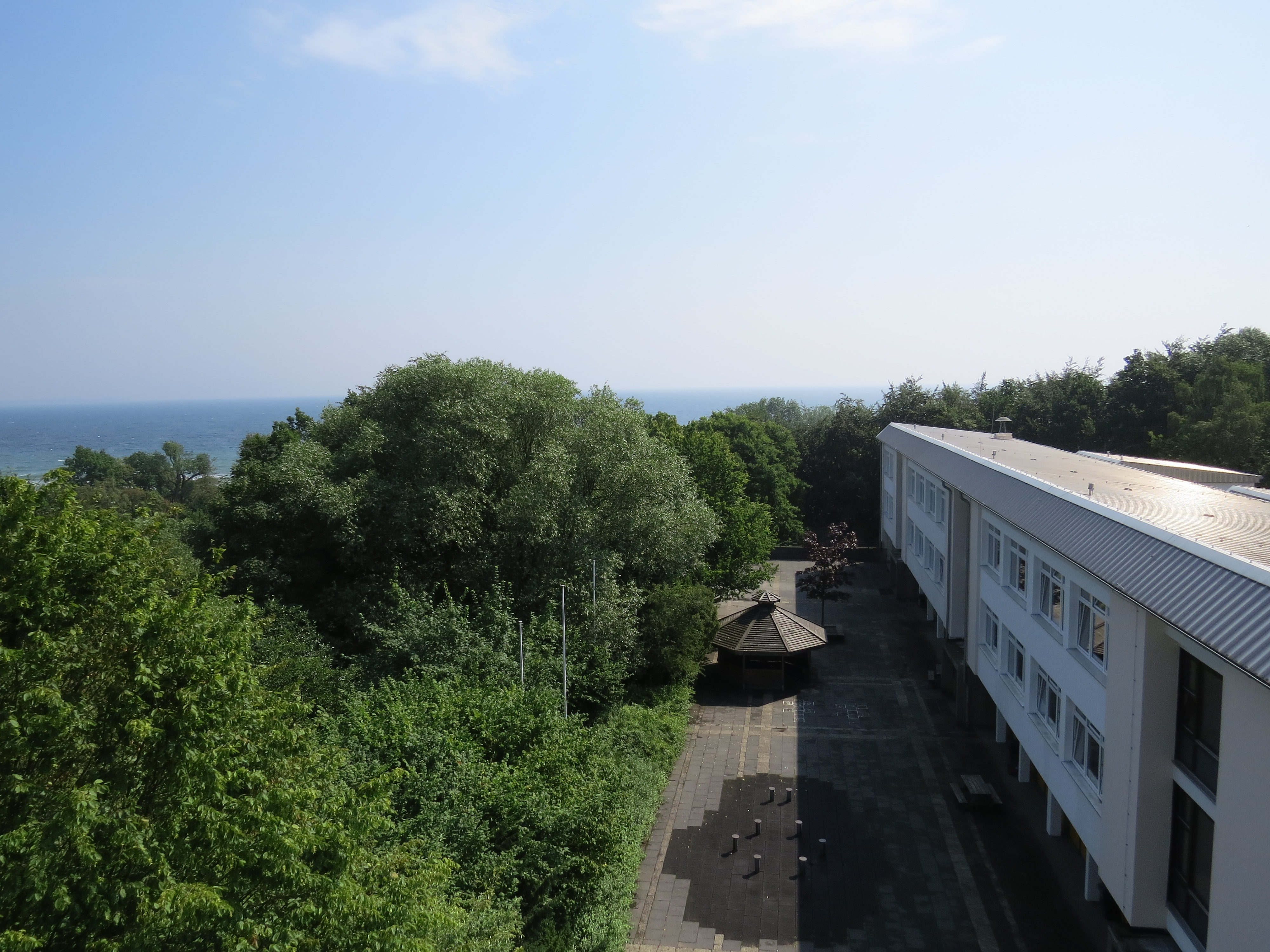 Meerblick